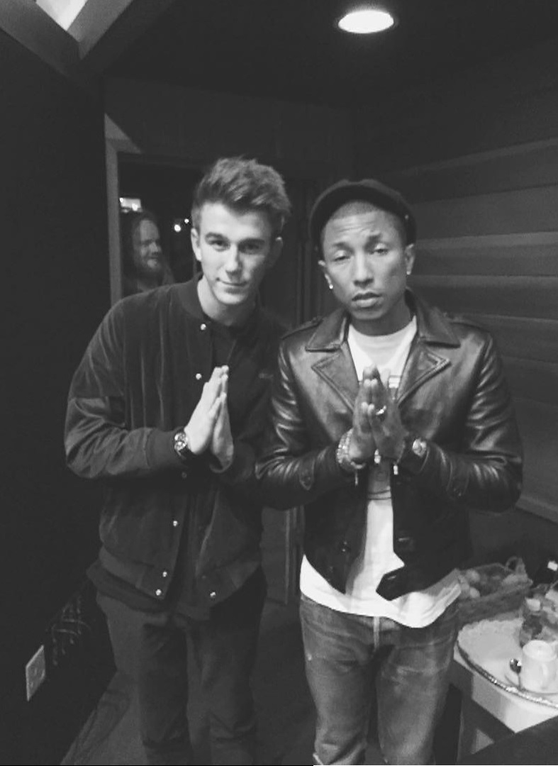 Samuel George Lewis junto a su ídolo, Pharrell Williams.